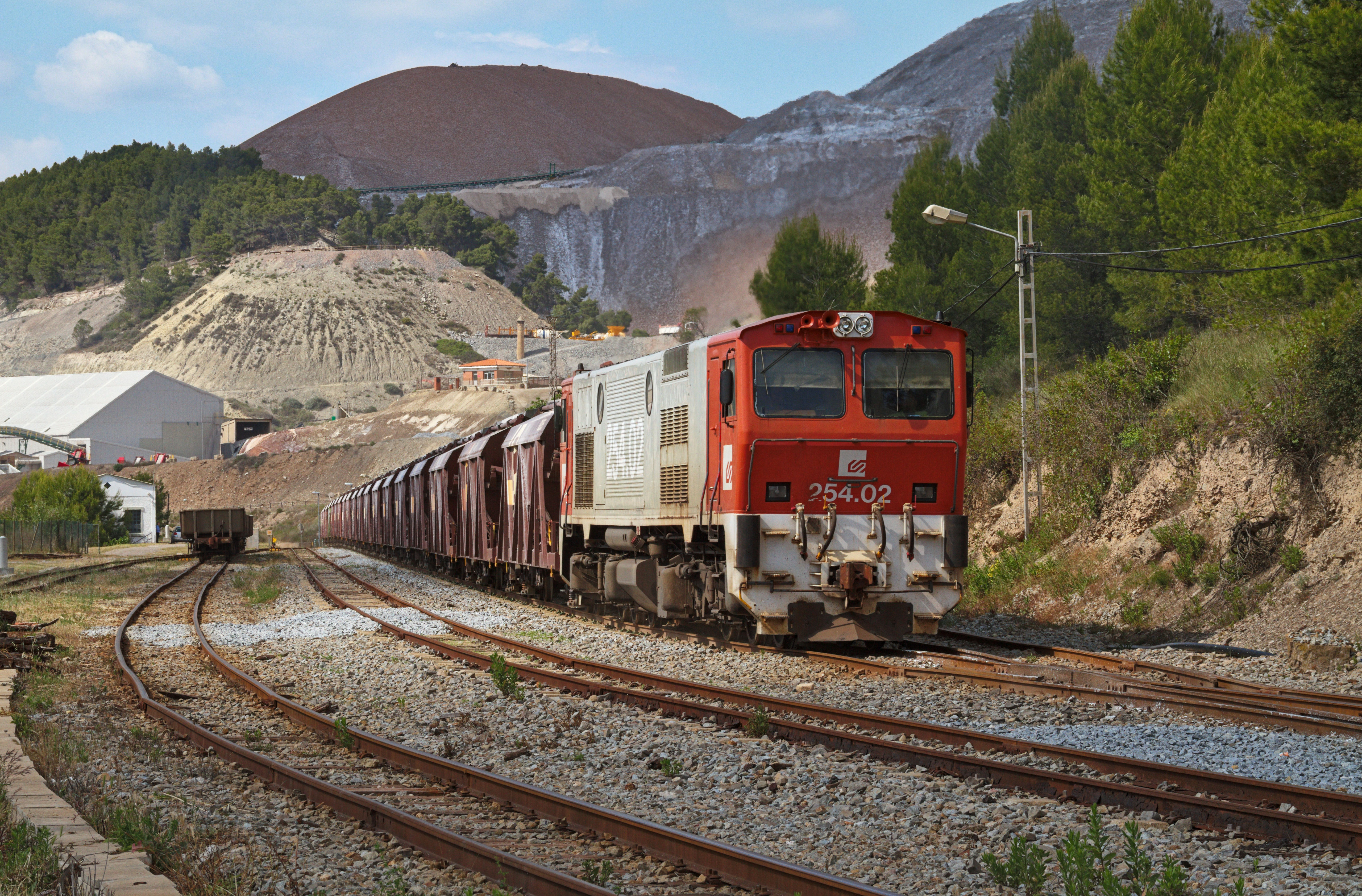 [CAT]: El dia començava molt enrarit, ja que havia vist a la potassa matinal tornant a buscar terra ferma, solcant les vies d'ample mètric cap a l'interior. Em disposava a realitzar una petita incursió com de costum i no hi havia ni rastre del mercant a Manresa-Alta, tan sols hi havien 2 possibilitats, o be que hagués pujat a la mina abans de hora, o que hagués tornat per on havia vingut -cosa molt poc probable-. Així que tocava fer un tomb per Sant Iscle per veure si les senyals ferroviàries em donàvem alguna pista, un cop examinades, va tocar allunyar-se del ramal de Sallent i anar una mica cap a l'oest. Vaig arribar a la localitat de Súria i allà estaven les dues, la 02 amb la potassa i la 01 amb la sal, prenent la seva ració diària de sol i clorur. Immortalitzada la 02 encarregada de portar la potassa cap al port, en el moment de realitzar la sortida de la mina. [ES]: El día empezaba sumamente enrarecido, ya que tenía la certeza, de que la potasa matinal había vuelto en busca de tierra firme, surcando las vías de ancho métrico hacia el interior. Me dispuse a realizar una pequeña incursión como de costumbre y no había ni rastro del mercante en Manresa-Alta, solo habían 2 posibilidades, o bien que hubiera subido a la mina antes de hora, o que lo volvieran a bajar a Martorell -cosa muy poco probable-. Así que tocaba avanzadilla hasta Sant Iscle para ver si las señales ferroviarias me arrojaban algo de luz, una vez examinadas, tocó un cambio de tercio, nos vamos un poco hacia el oeste. Llegué a la localidad de Súria y allí estaban las dos, la 02 con la potasa y la 01 con la sal, tomando su ración diaria de sol y cloruro. Inmortalizada la 02 encargada de llevar la potasa hacia el puerto en el momento de realizar su salida de la mina.